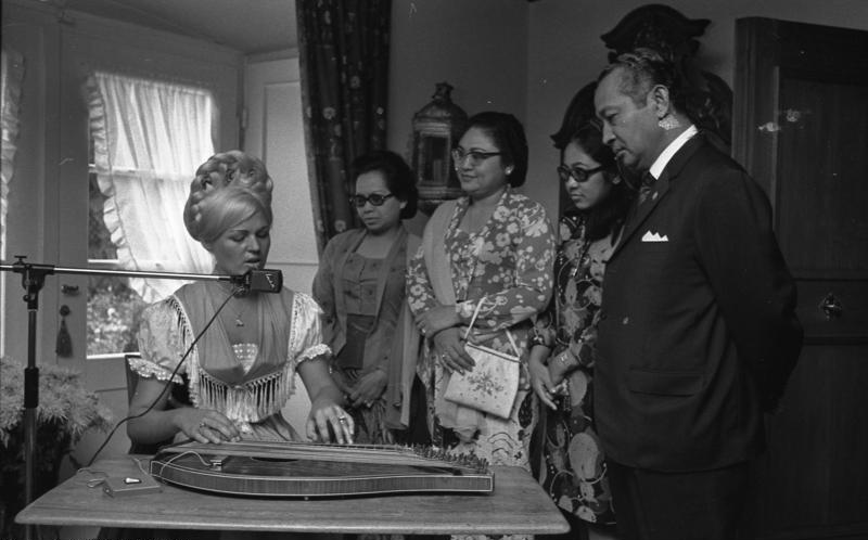 Staatsbesuch - Indonesien, Präsident Suharto in Berchtesgaden (Gut Schubert)